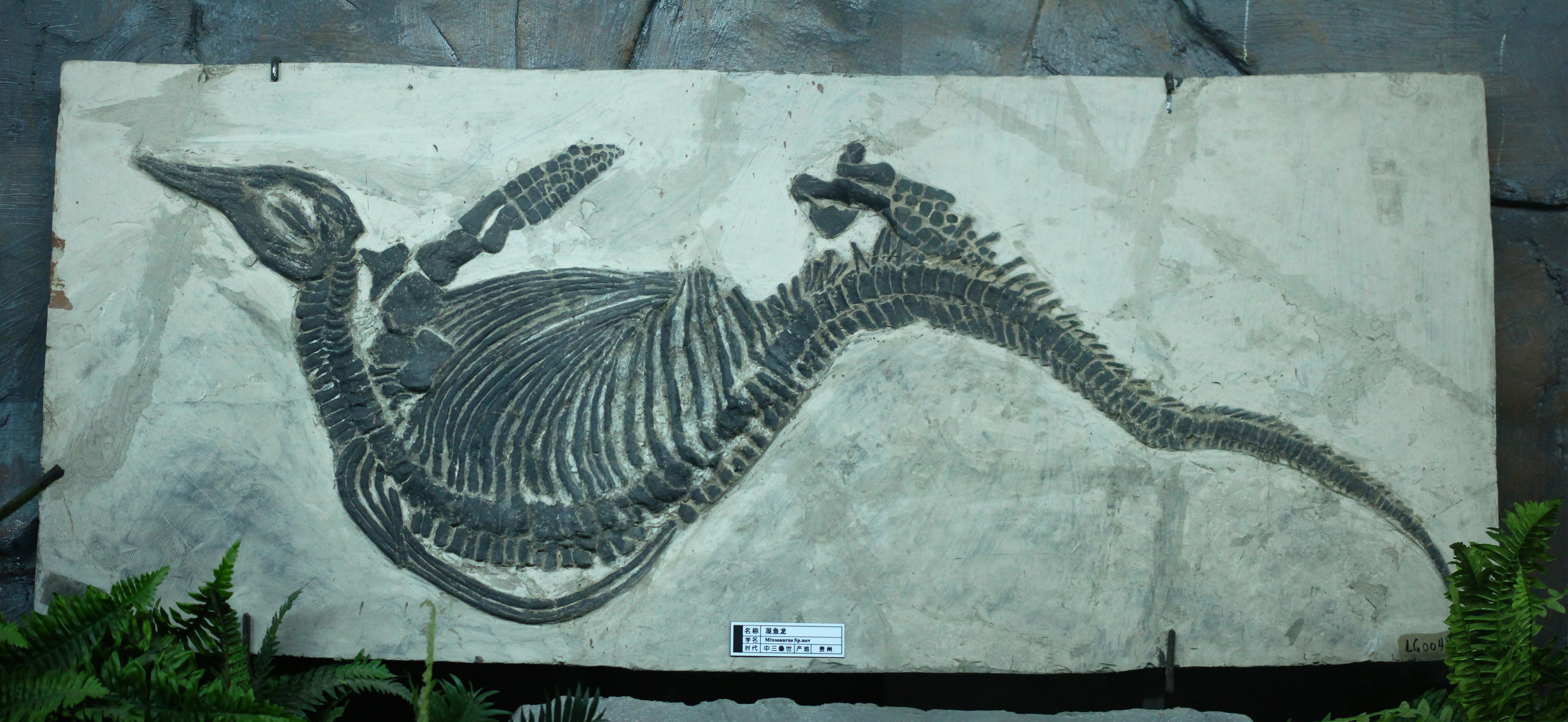 混鱼龙 Mixosaurus。中三叠世。产地中国贵州。